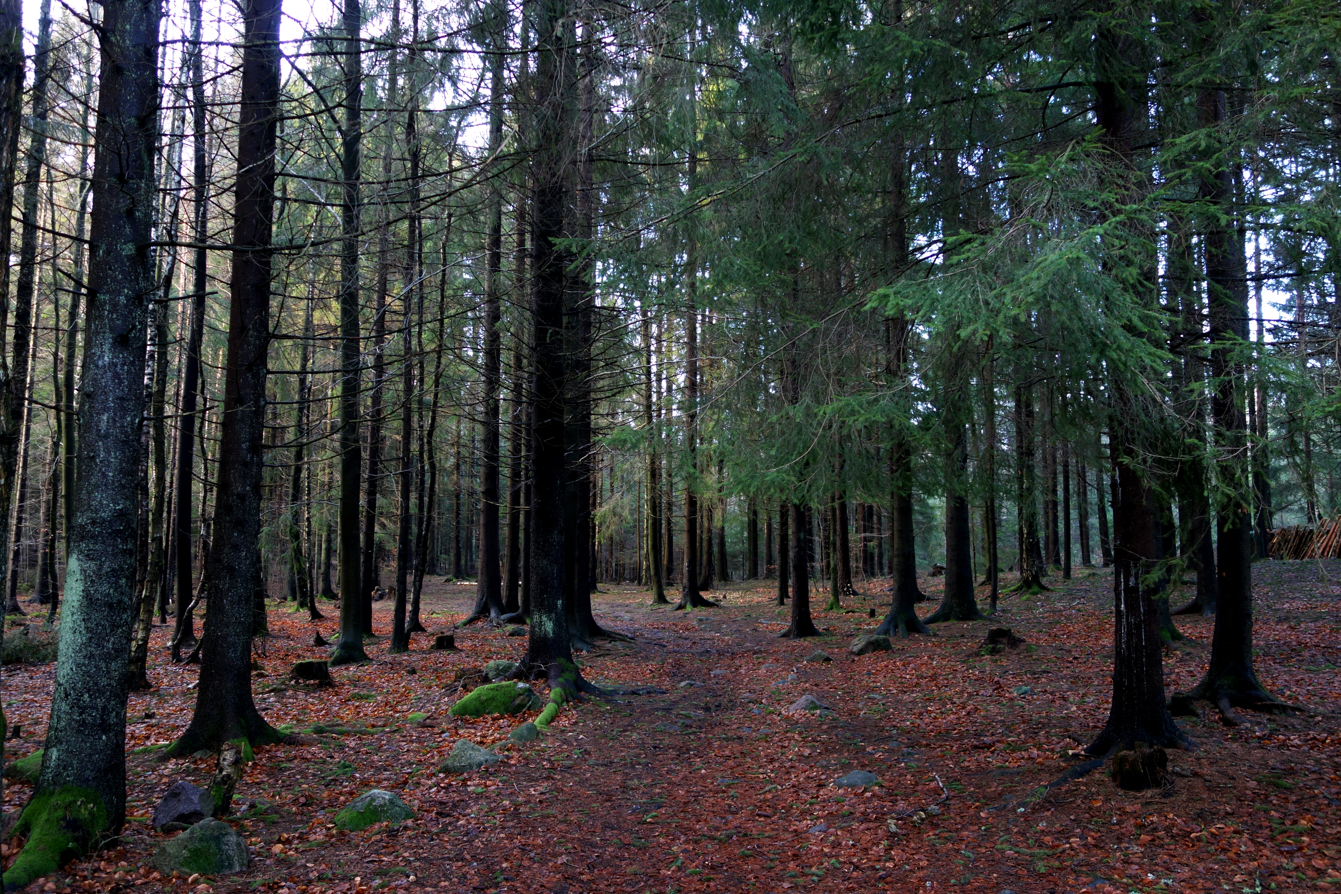 Teieskogen på Nøtterøy i Vestfold